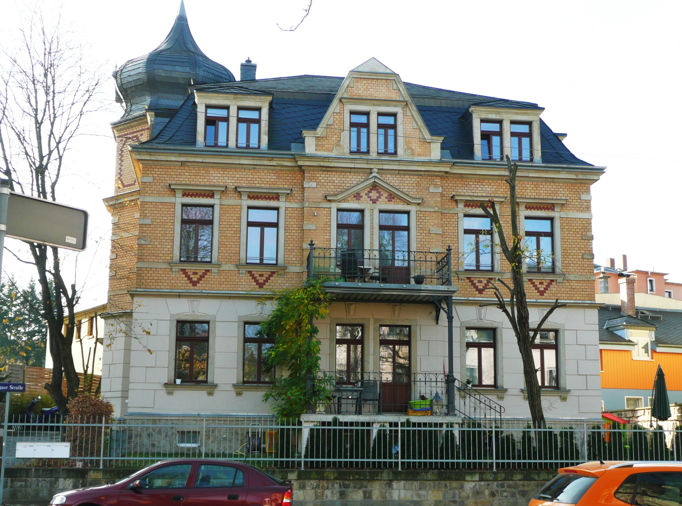 Rathaus Luga Lugaer Straße108